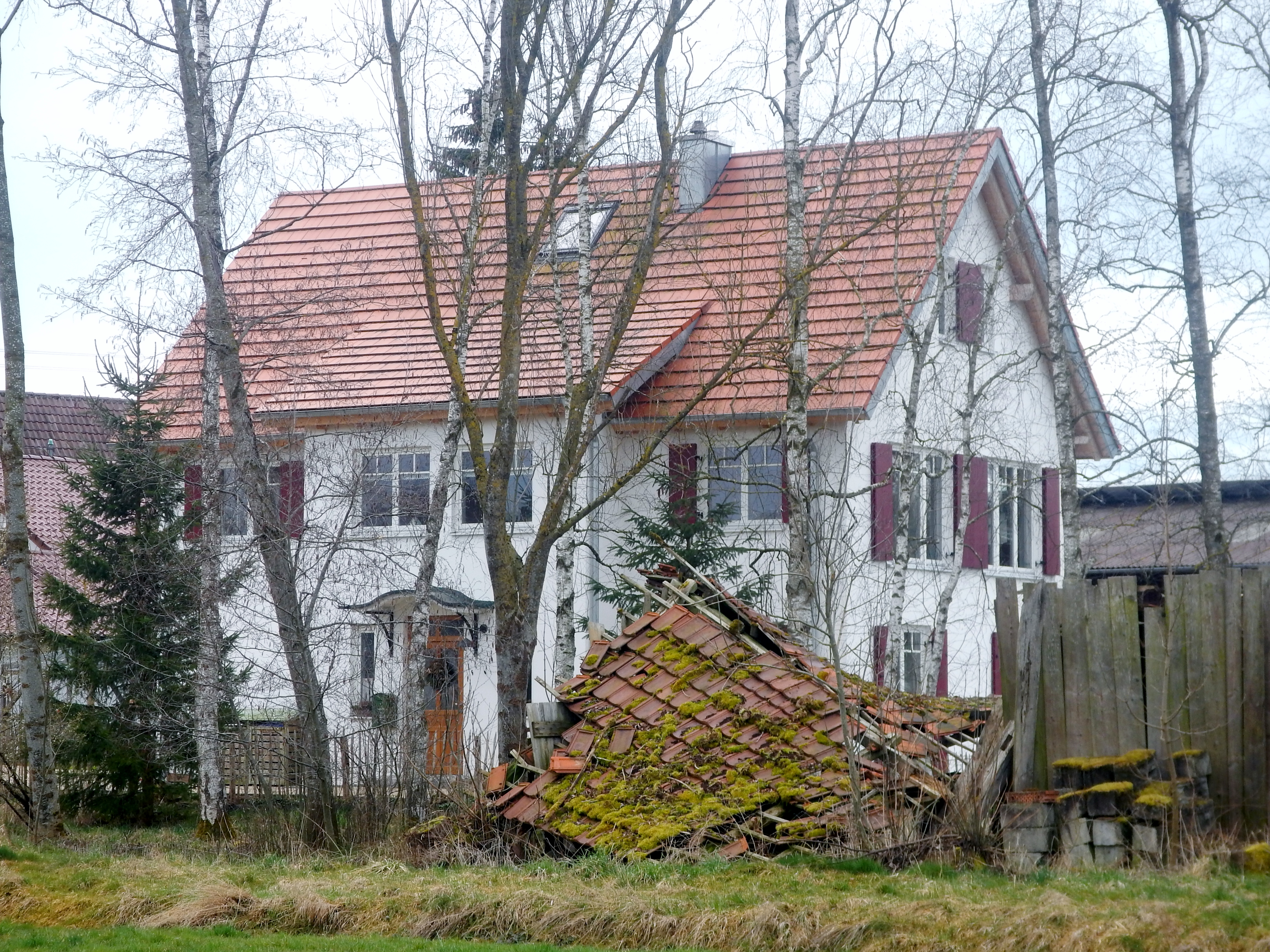 Zerfallener Schuppen in Tiefenbach